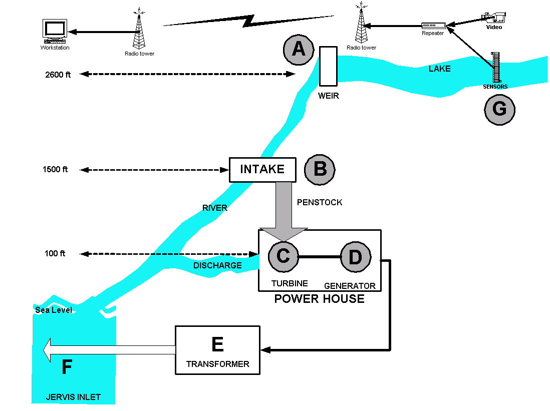 Malibu Hydro Power Flow Diagram